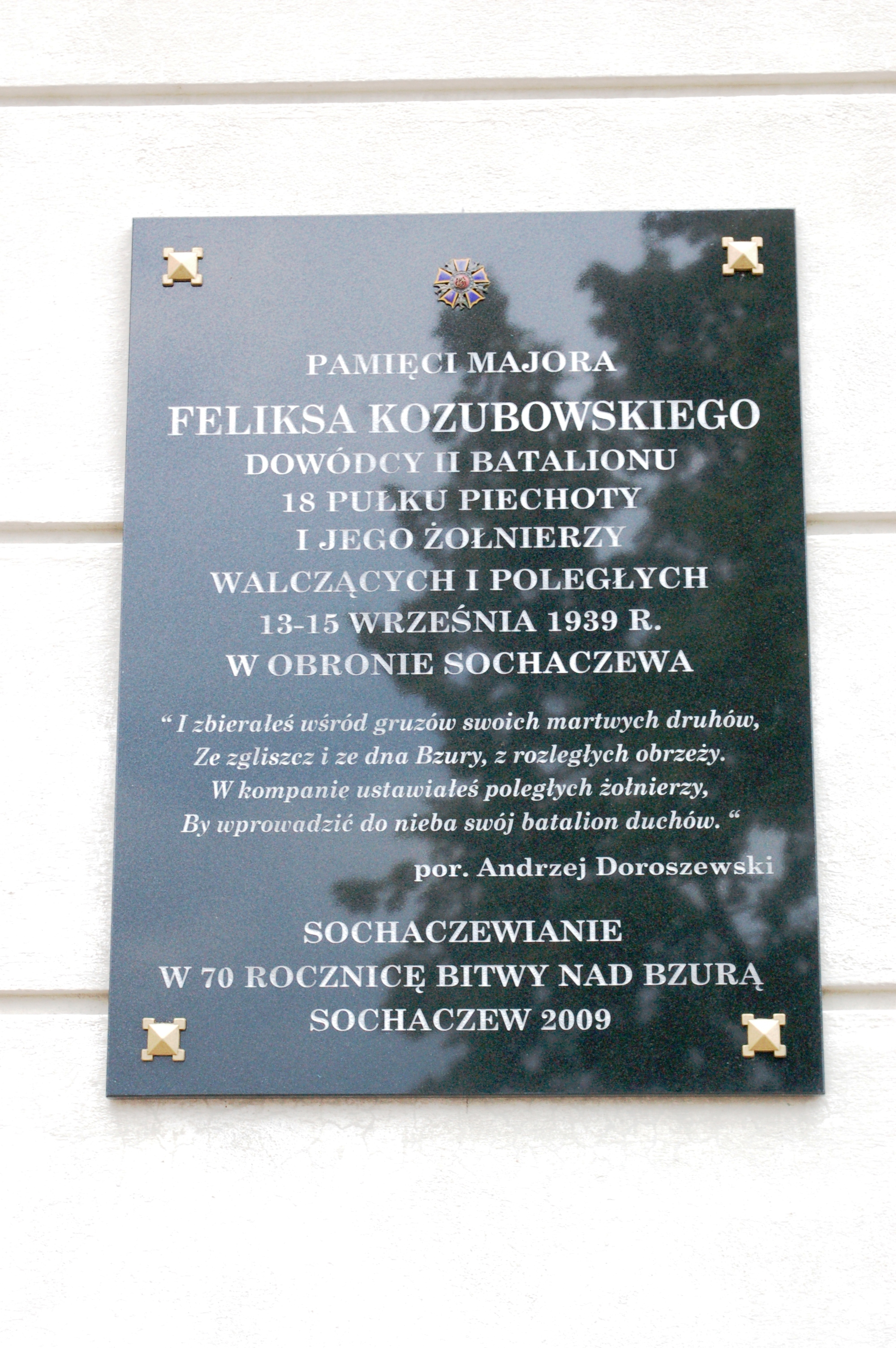 Sochaczew